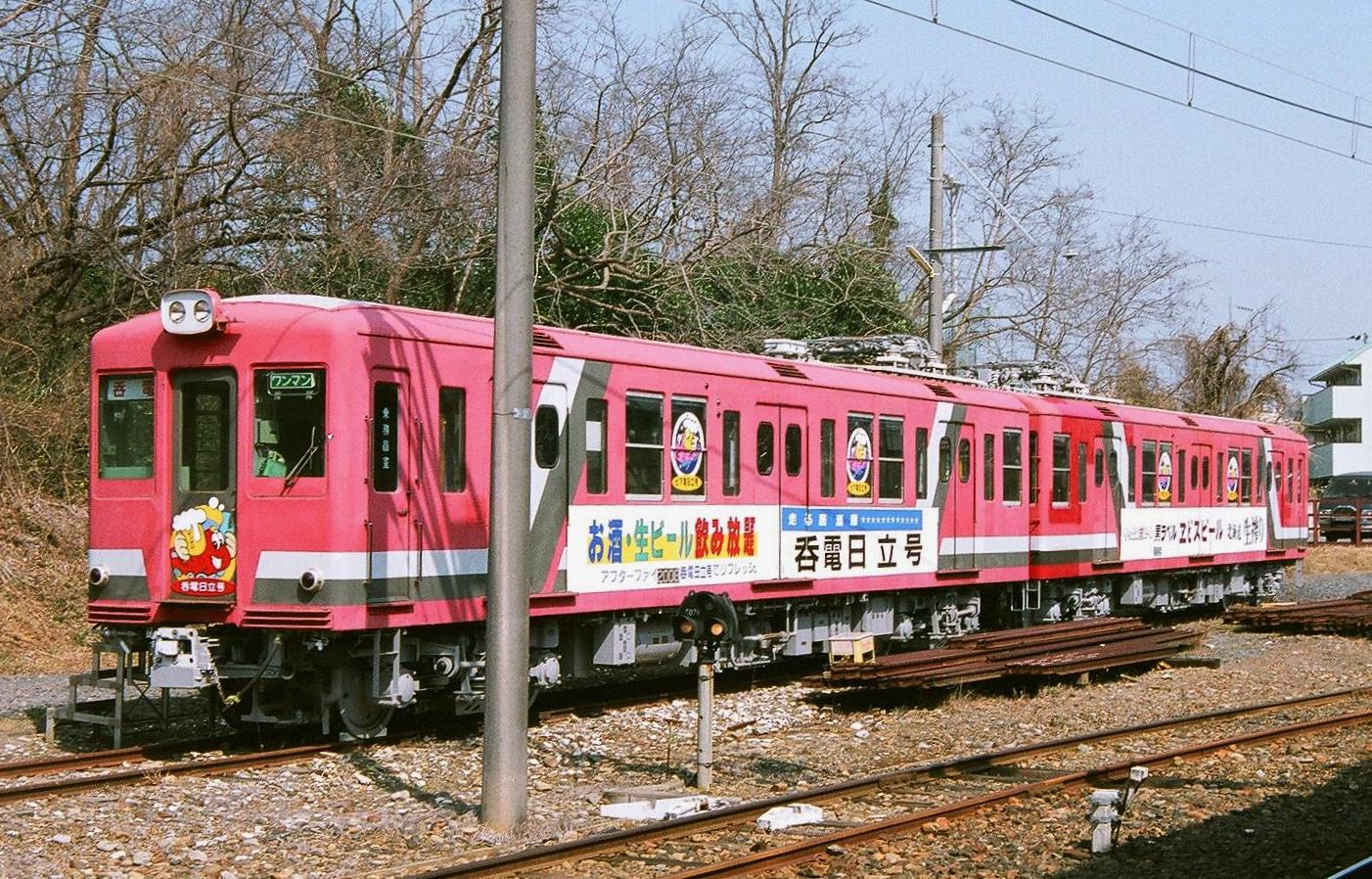 Hitachi-Dentetsu Railway Type 2000(2008+2007) Train (Japan). Taking a picture from Omika-Station platform in Hitachi-Dentetsu-line. 営団2000形電車改造の日立電鉄2000系電車 画像は2008+2007の2両編成。 この編成は「呑電（どんでん）日立号」として、飲料カウンターの設置、車内への簡易テーブルの取付等が行われ 車内で宴会が出来るイベント用車両への改造がされている。 側面にはPR広告が貼られている。 日立電鉄線大甕駅のホームより撮影。